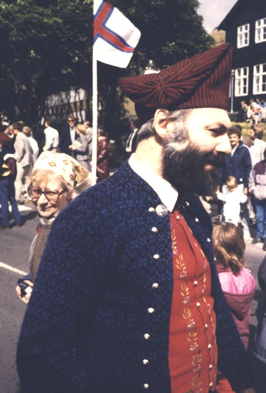 Färinger am Ólavsøka 1984 / Ein Färinger in nationaler Tracht der Männer auf den Färöern am Nationalfeiertag in der Fußgängerzone von Tórshavn. Im Hintergrund weht die National-Flagge der Färöer